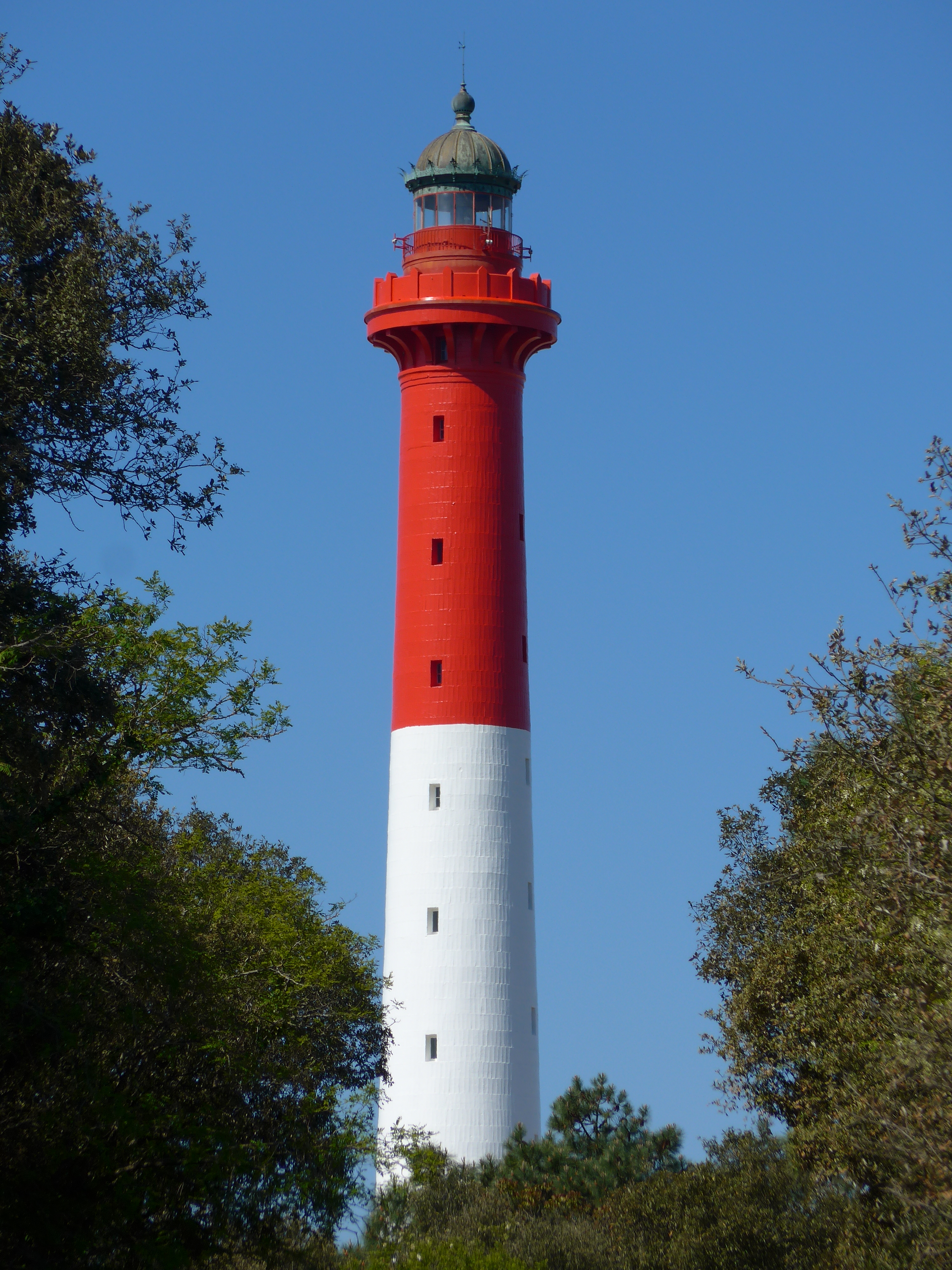 grand beau